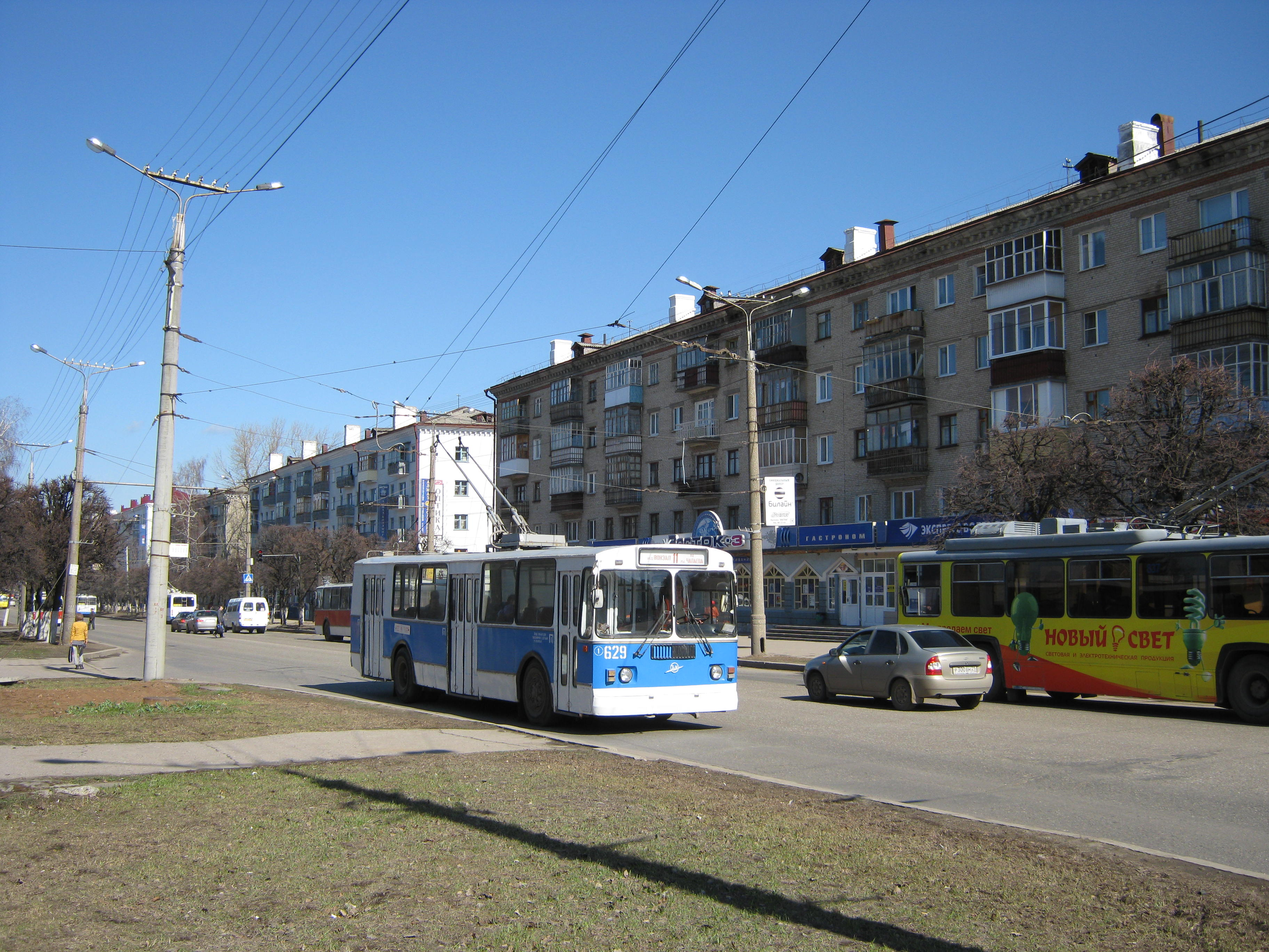 Троллейбусы на проспекте Ленина (г. Чебоксары).